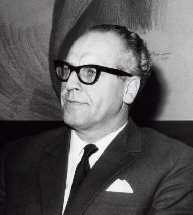 Vrolijk, M. (PvdA). Minister Vrolijk van Cultuur, Recreatie en Maatschappelijk Werk, aanwezig bij een besloten bijeenkomst van de Amsterdamse sportpers in het restaurant van het Olympisch Stadion. Achter hem: een schilderij van Baron van Tuyll van Serooskerken die voorzitter van het NOC was van 1912 tot 1924. Nederland, Amsterdam, 6 januari 1966.